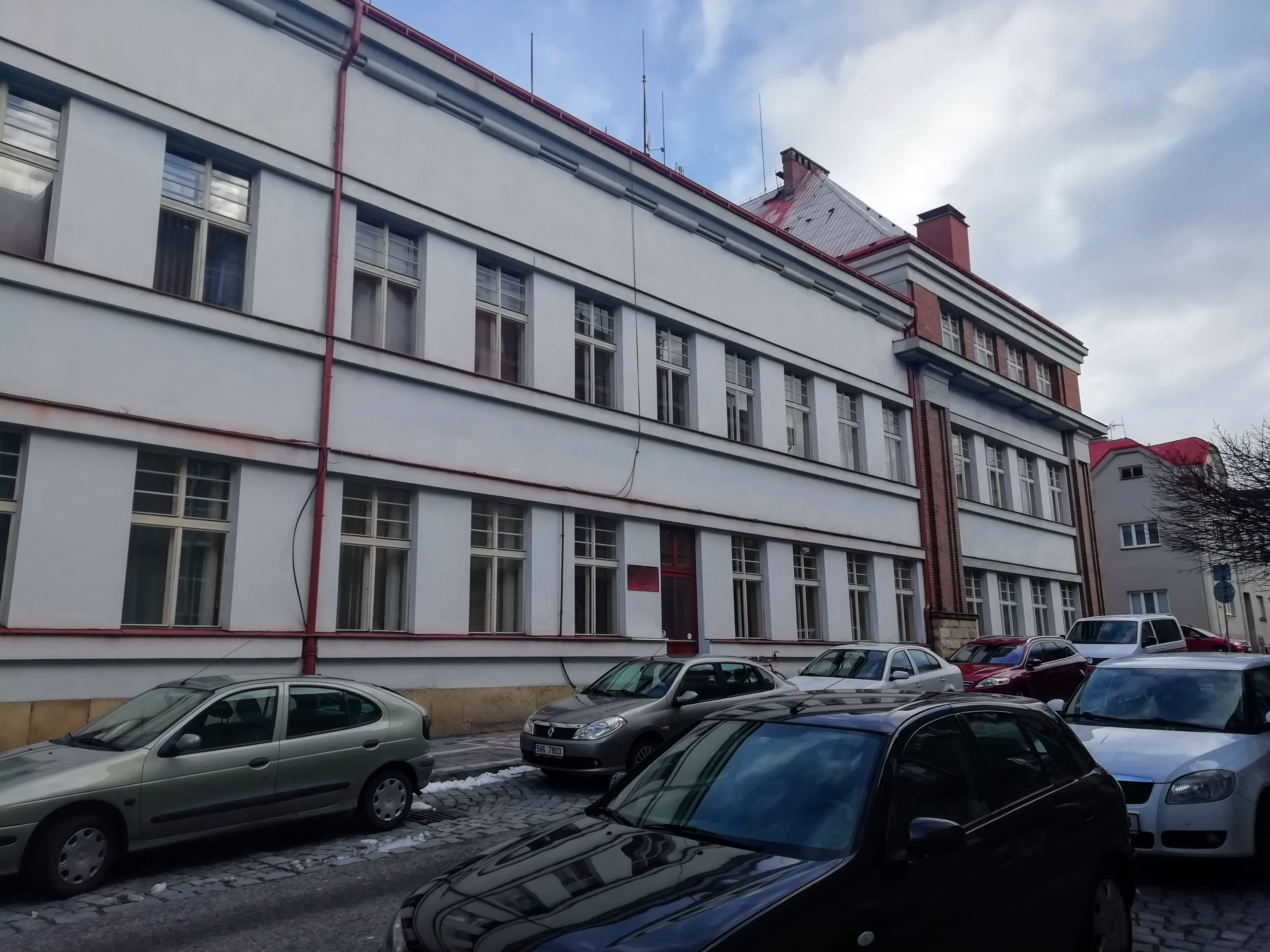 Pohled na vstup do školní jídelny SPŠ Jičín, Denisova čp. 212.